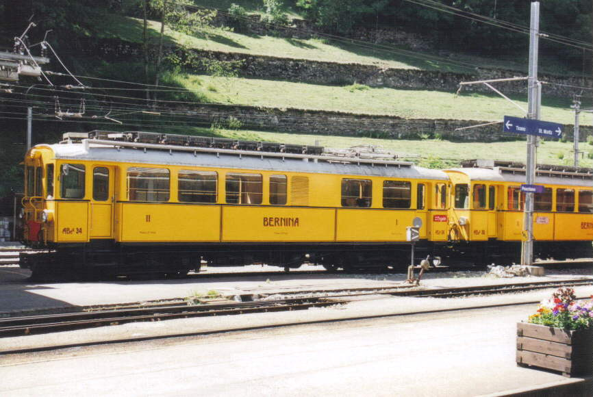 Die zwei in den Originalzustand zurückversetzten Triebwagen ABe 4/4 I 30 und 34 am de:22. Juni de:2003 im Depot Poschiavo. Steffen Mokosch